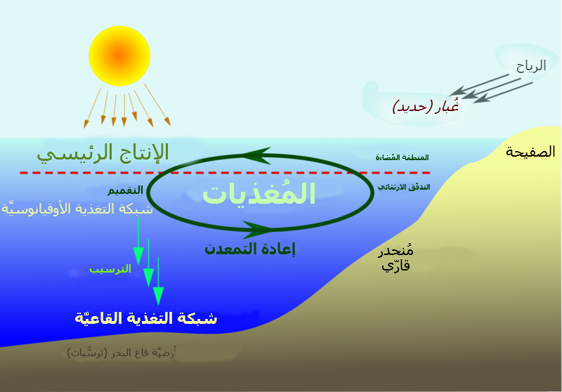 رسمٌ يوضح الدورة الغذائيَّة في البحار.